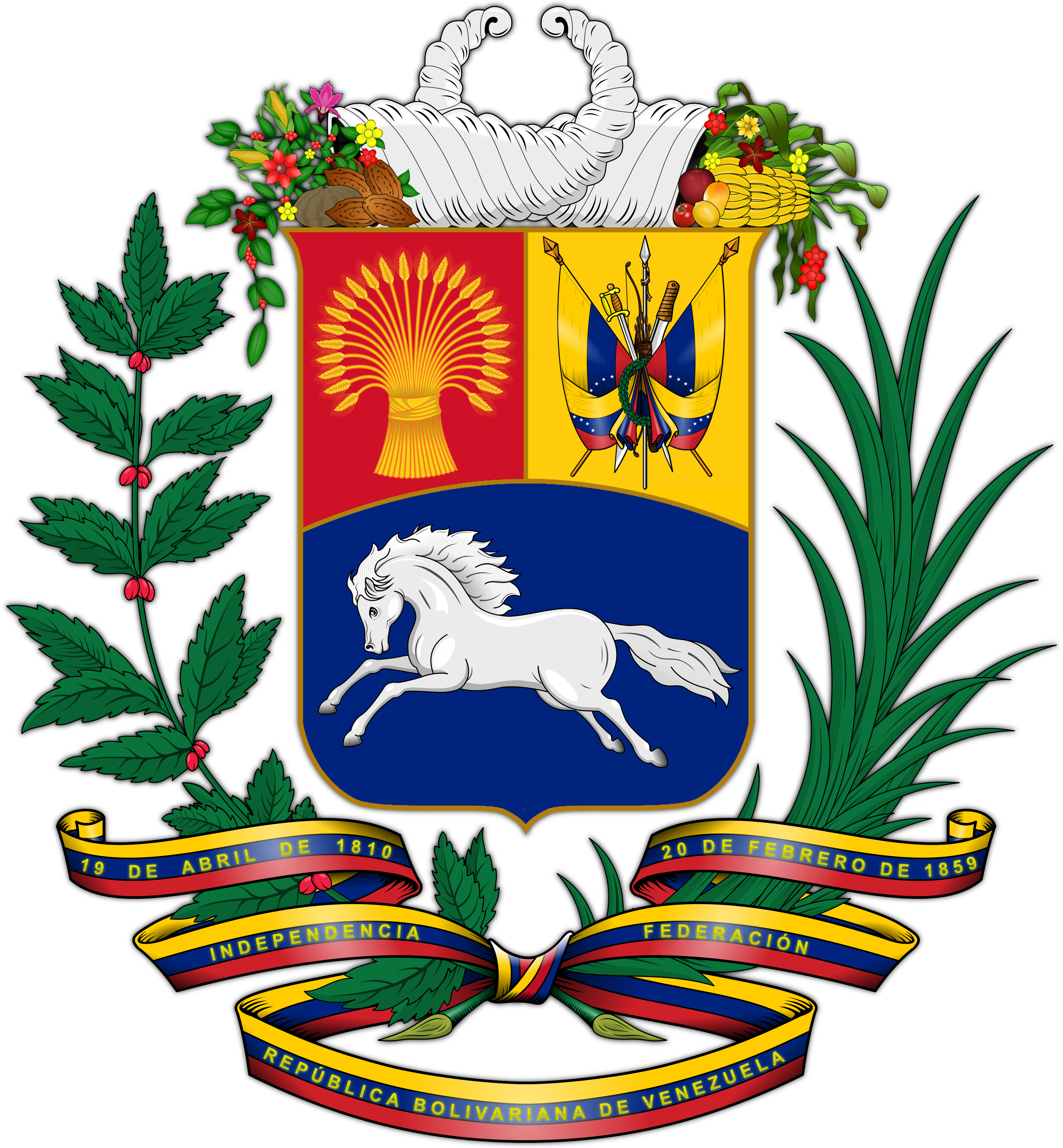 Escudo de Armas de la República Bolivariana de Venezuela. Aprobado en Gaceta Oficial número 38.394 del 9 de marzo de 2006. Es el escudo oficial de Venezuela hasta el presente